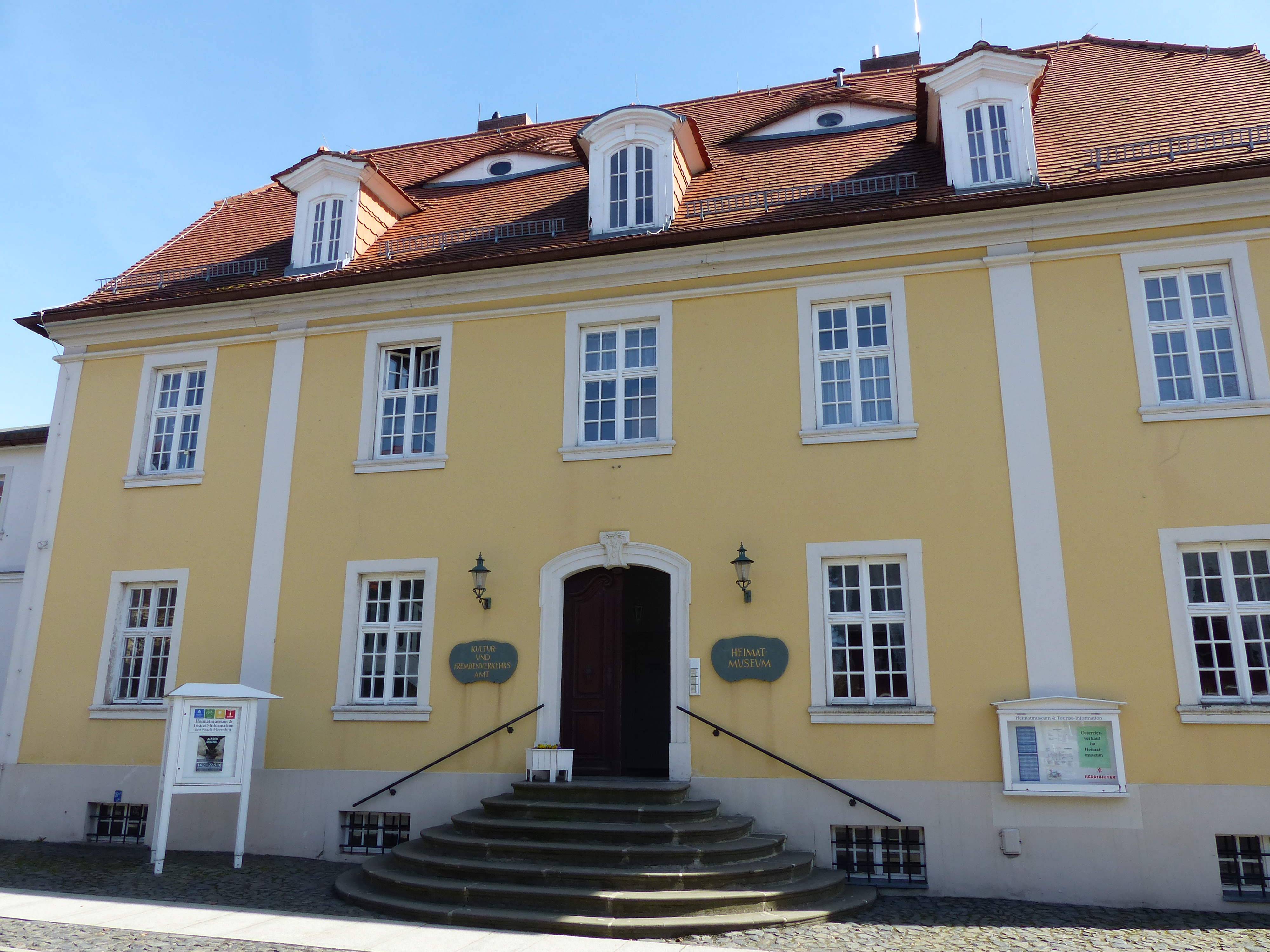 Denkmalgeschütztes Gebäude, Heimatmuseum, Comeniusstraße 6, Herrnhut